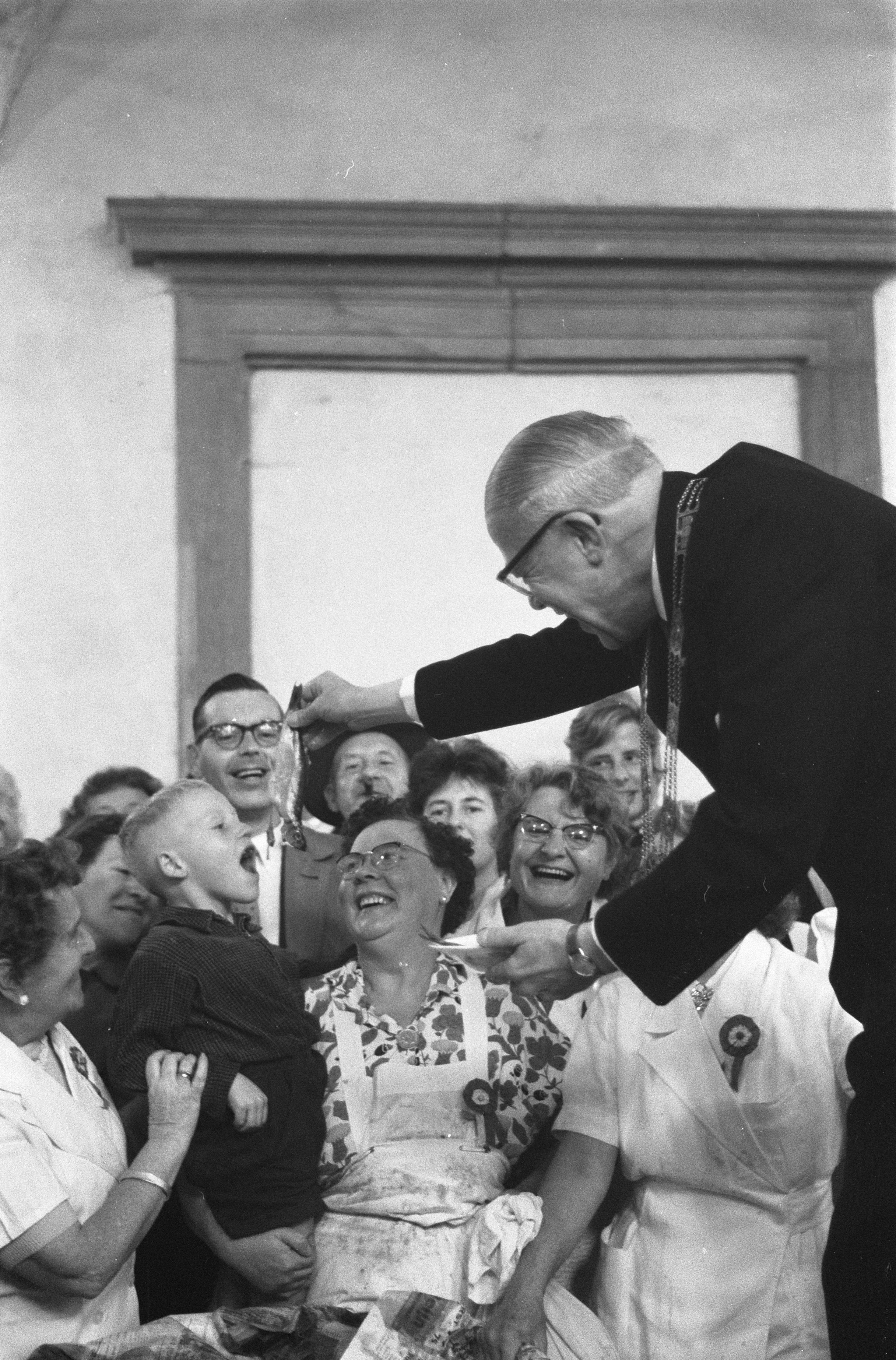 Collectie / Archief : Fotocollectie Anefo Reportage / Serie : [ onbekend ] Beschrijving : 3 oktober feesten in Leiden, burgemeester jhr. mr. F. H. van Kinschot deelt haring uit Datum : 3 oktober 1960 Locatie : Leiden, Zuid-Holland Trefwoorden : FEESTEN, HARINGEN, burgemeesters Persoonsnaam : jhr. mr. F. H. van Kinschot Fotograaf : Pot, Harry / Anefo Auteursrechthebbende : Nationaal Archief Materiaalsoort : Negatief (zwart/wit) Nummer archiefinventaris : bekijk toegang 2.24.01.05 Bestanddeelnummer : 911-6429